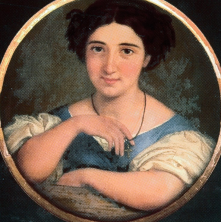 Ritratto di Maddalena Morocutti, olio su vetro di Giovanni Andrea Darif, s.d. (Udine, Civici musei).